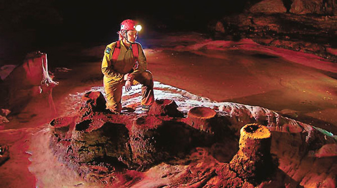 Imawarí Yeutá podría ser la más grande del mundo